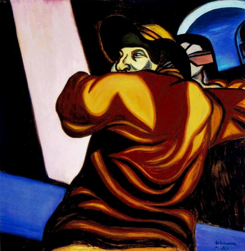 Vilho Lammen maalaus.